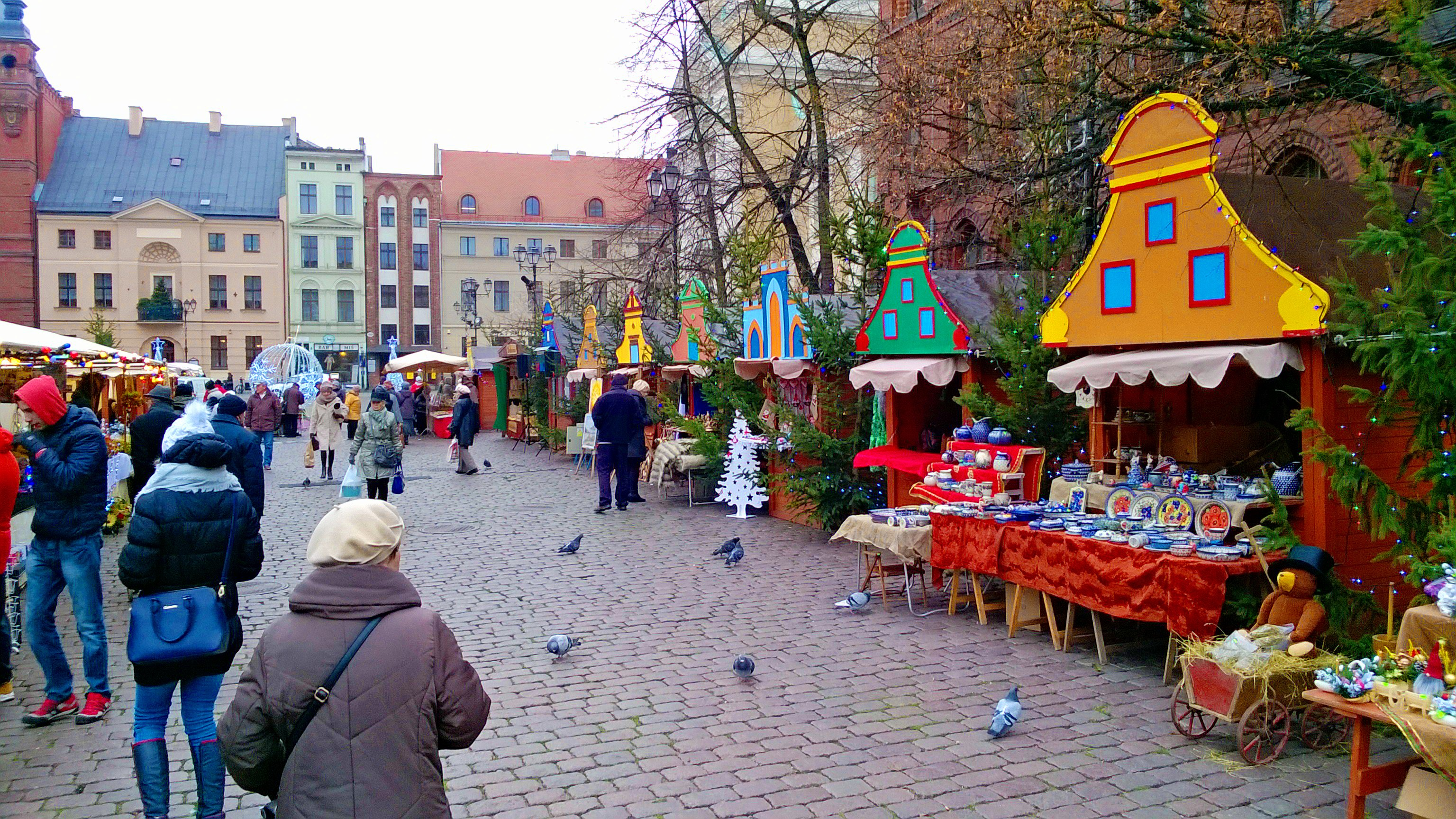 Jarmark Bożonarodzeniowy w Toruniu